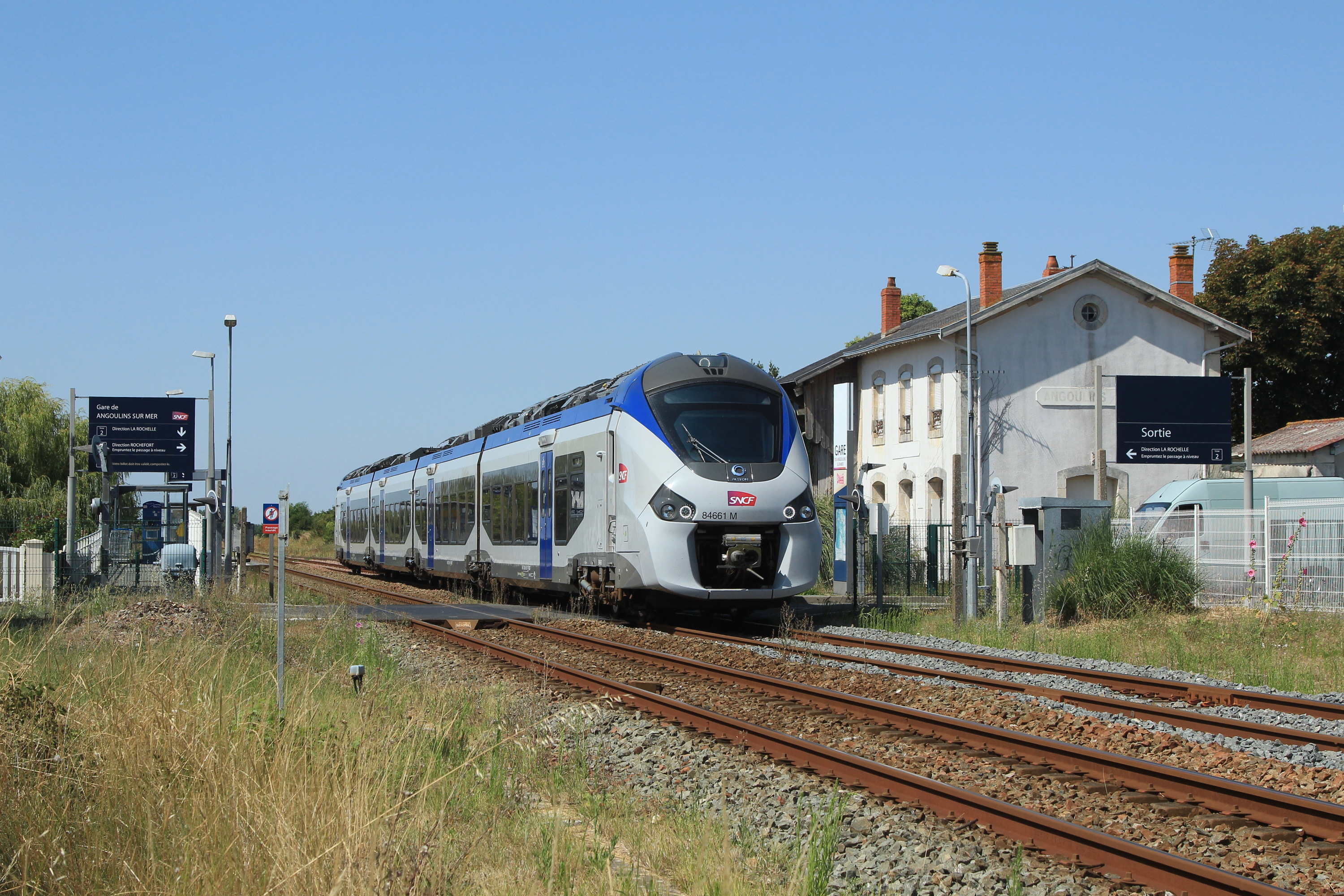 Le B 84661/2 sur un TER La Rochelle - Rochefort, arrive en gare d'Angoulins-sur-Mer.